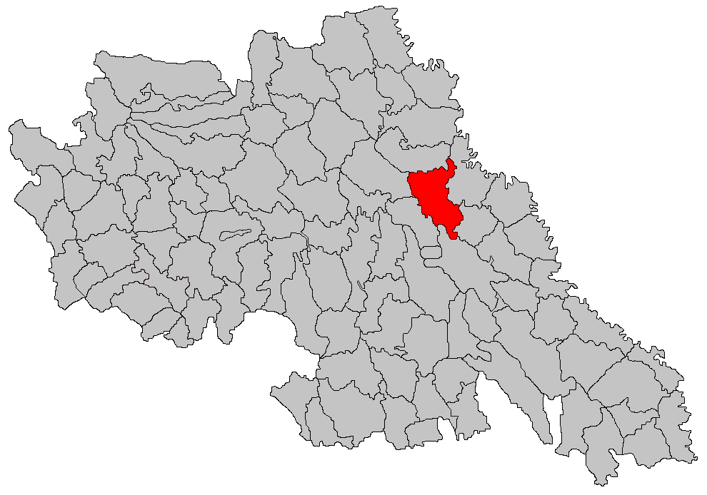 Categorie:Hărţi ale judeţului Iaşi